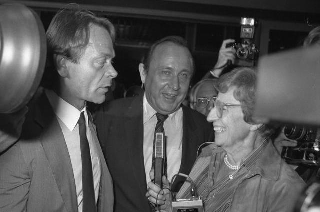 Bundestagswahl: Wahlparty im Bundeskanzleramt